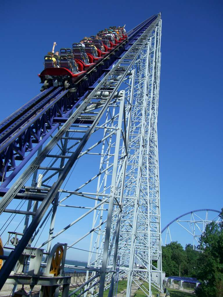 Millennium Force , montagnes russes à Cedar Point